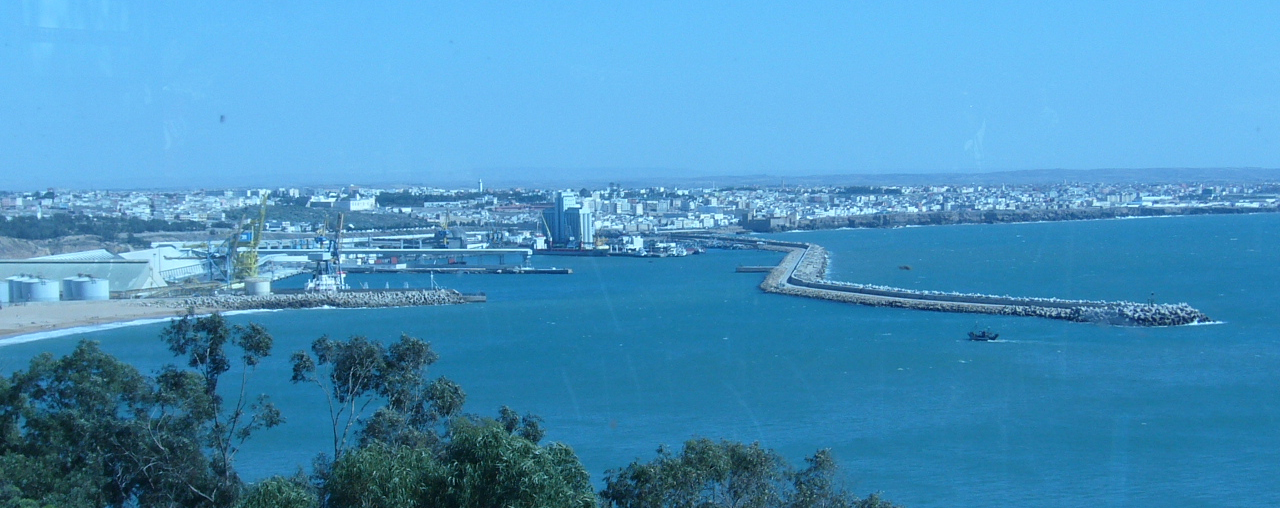 belle vue de la ville safi.